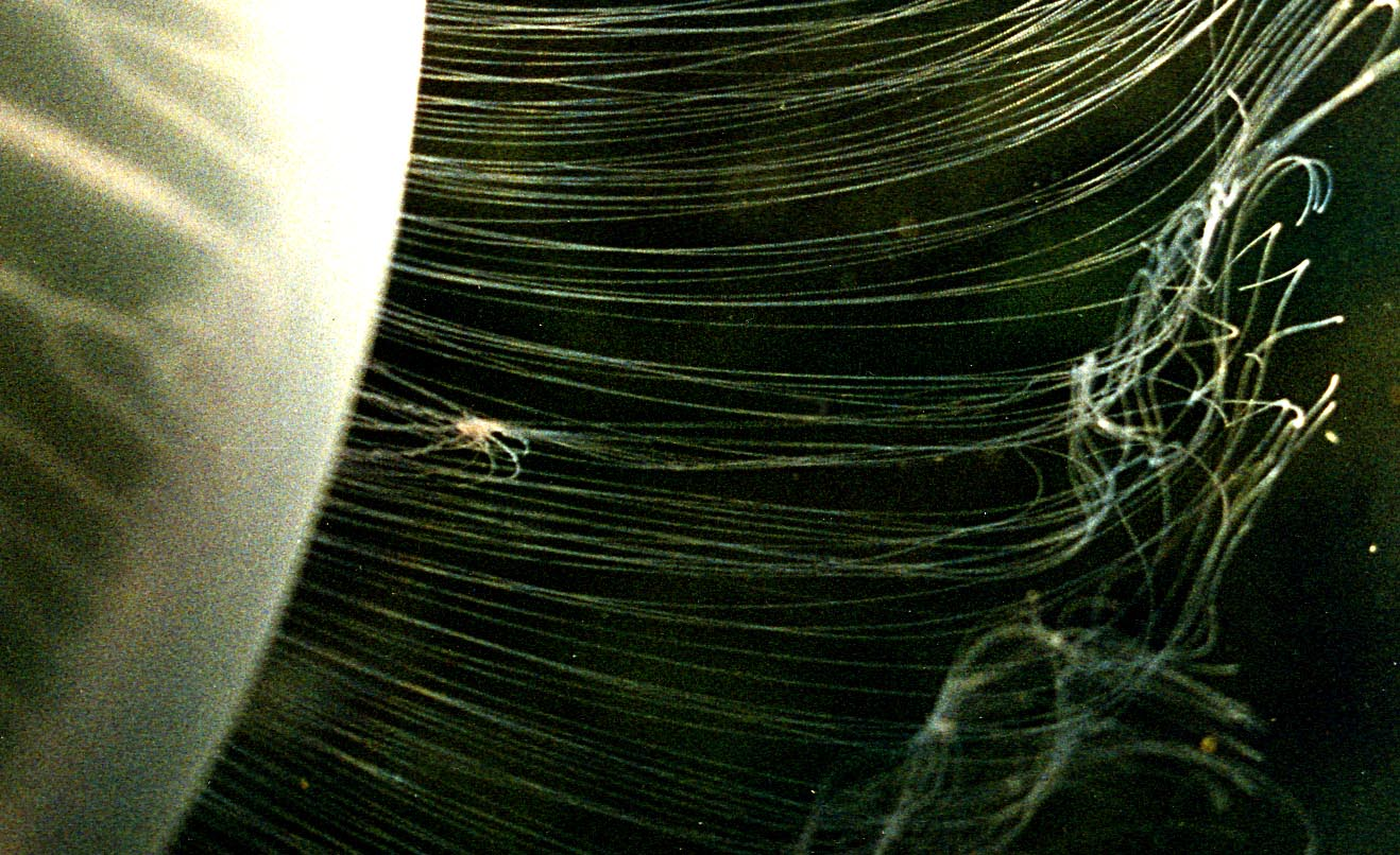 Aurelia aurita image uwe kils gfdl self